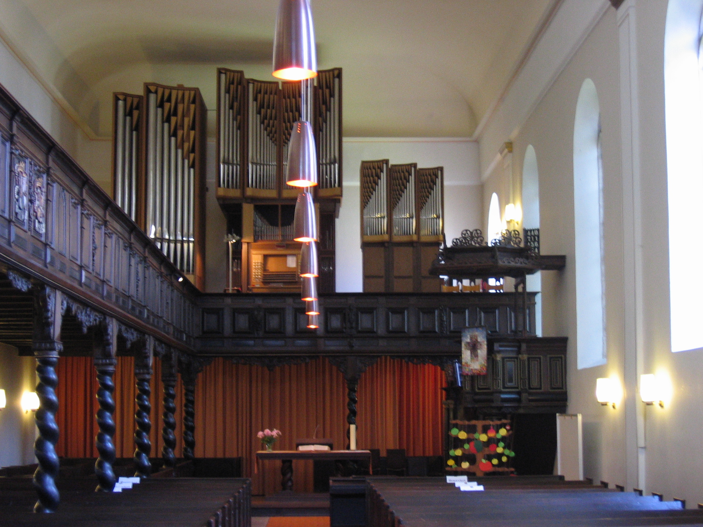 Innenansicht von St. Johann zu Lemgo